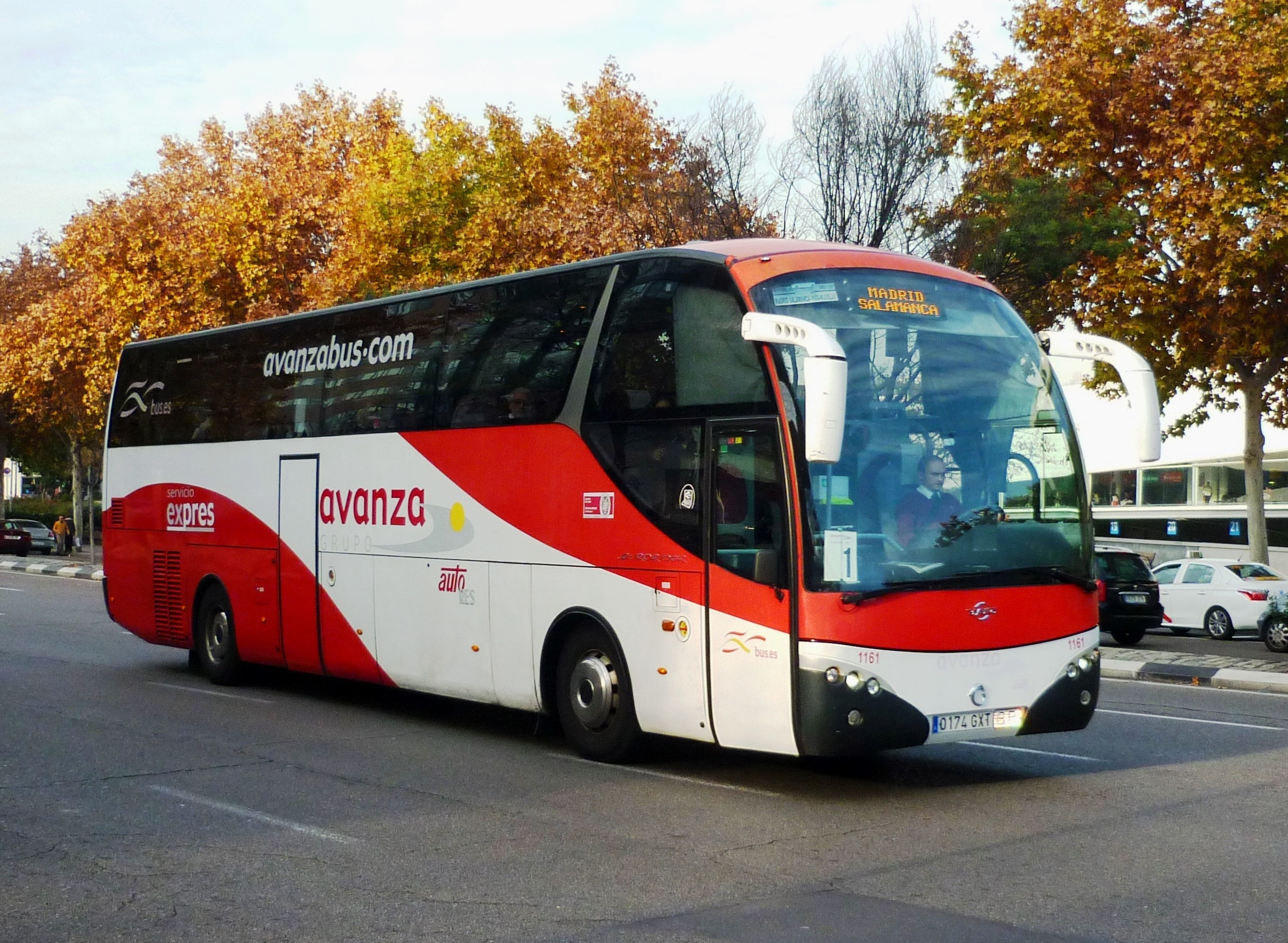 1161_Autores